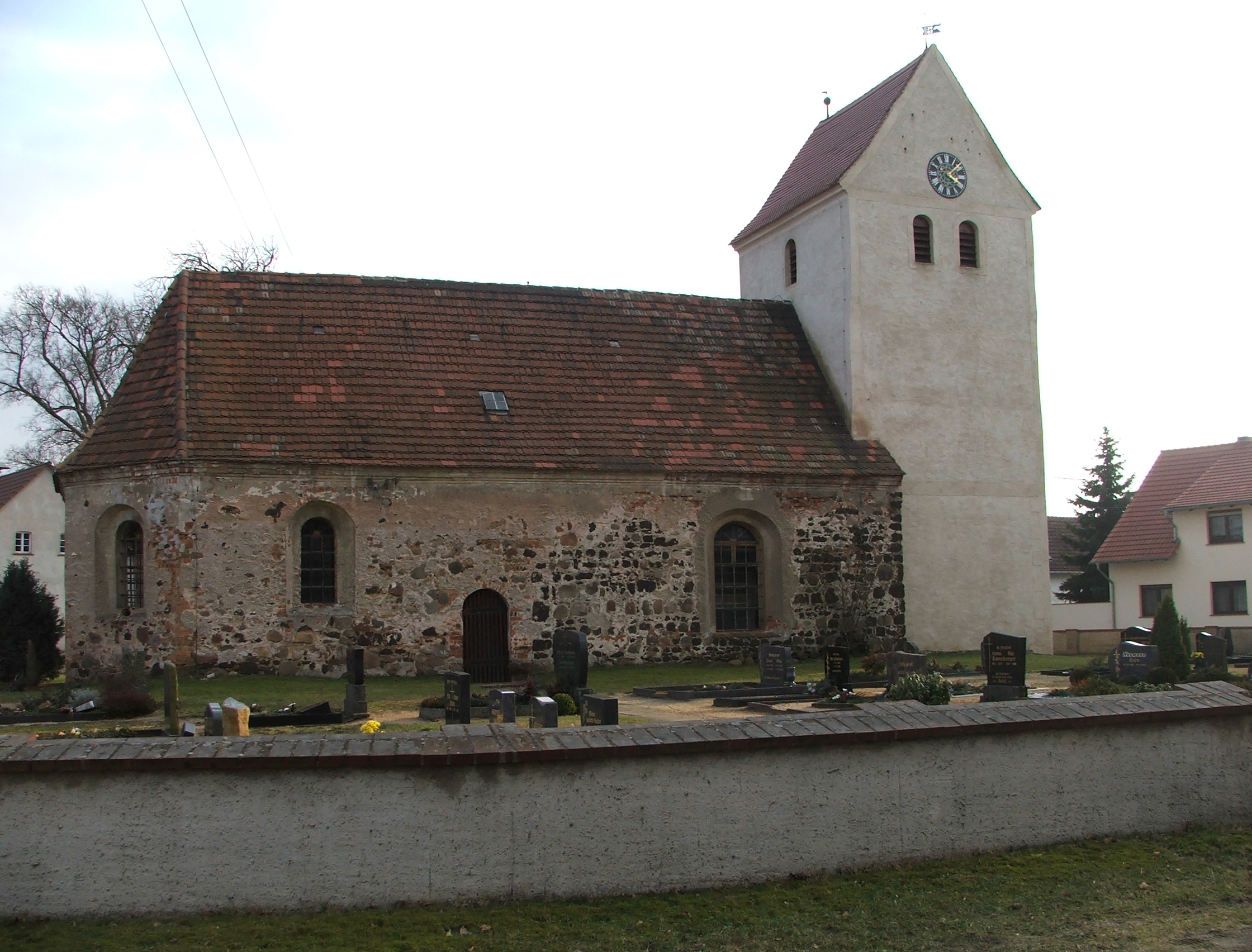 Kirche in Drasdo im brandenburgischen Landkreis Elbe-Elster